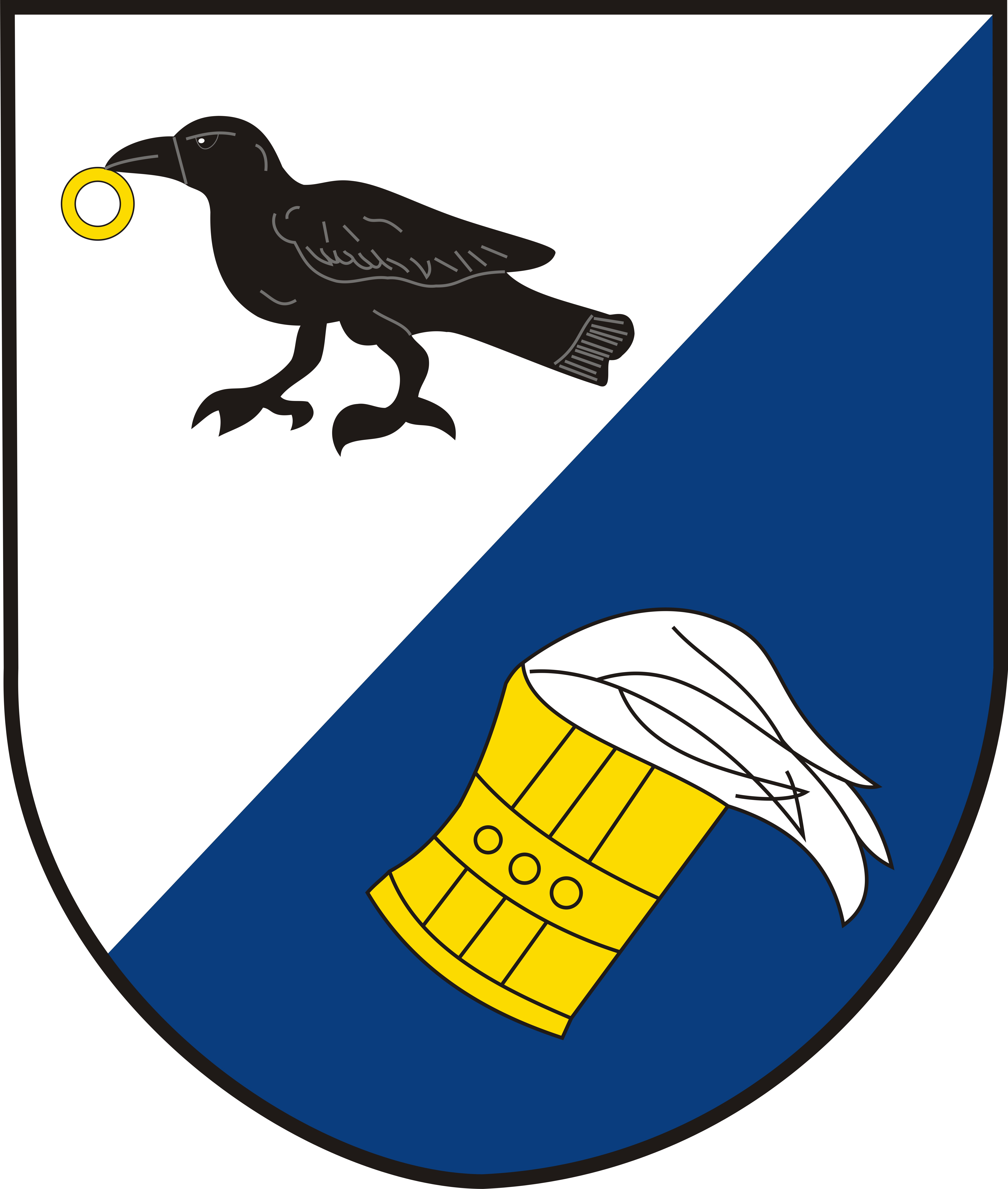 Znak obce Radkov v okrese Žďár nad Sázavou